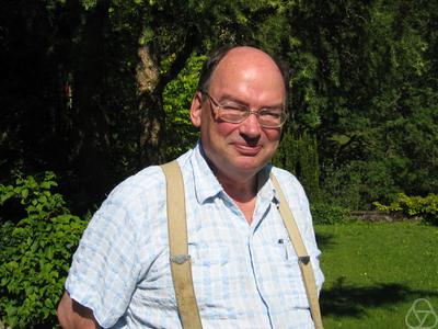 Foto di Ola Bratteli